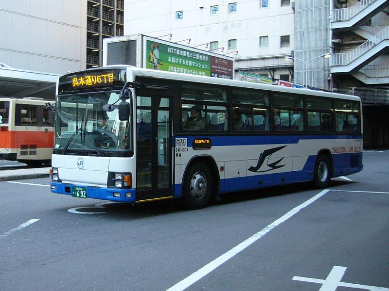 広島バスセンター(Hiroshima bus center)にて撮影 登録番号 広島200か・692 中国ジェイアールバス(Chugoku JR bus)広島支店所所属 車番641-4904 いすゞKL-LV280Q1 クレアライン用